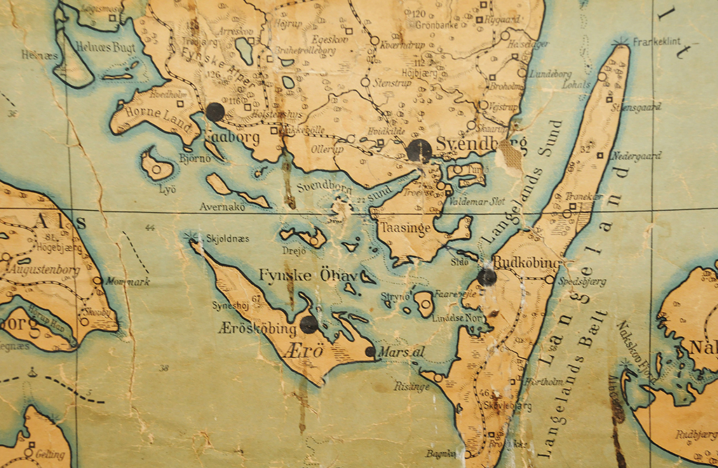 Øhavskort